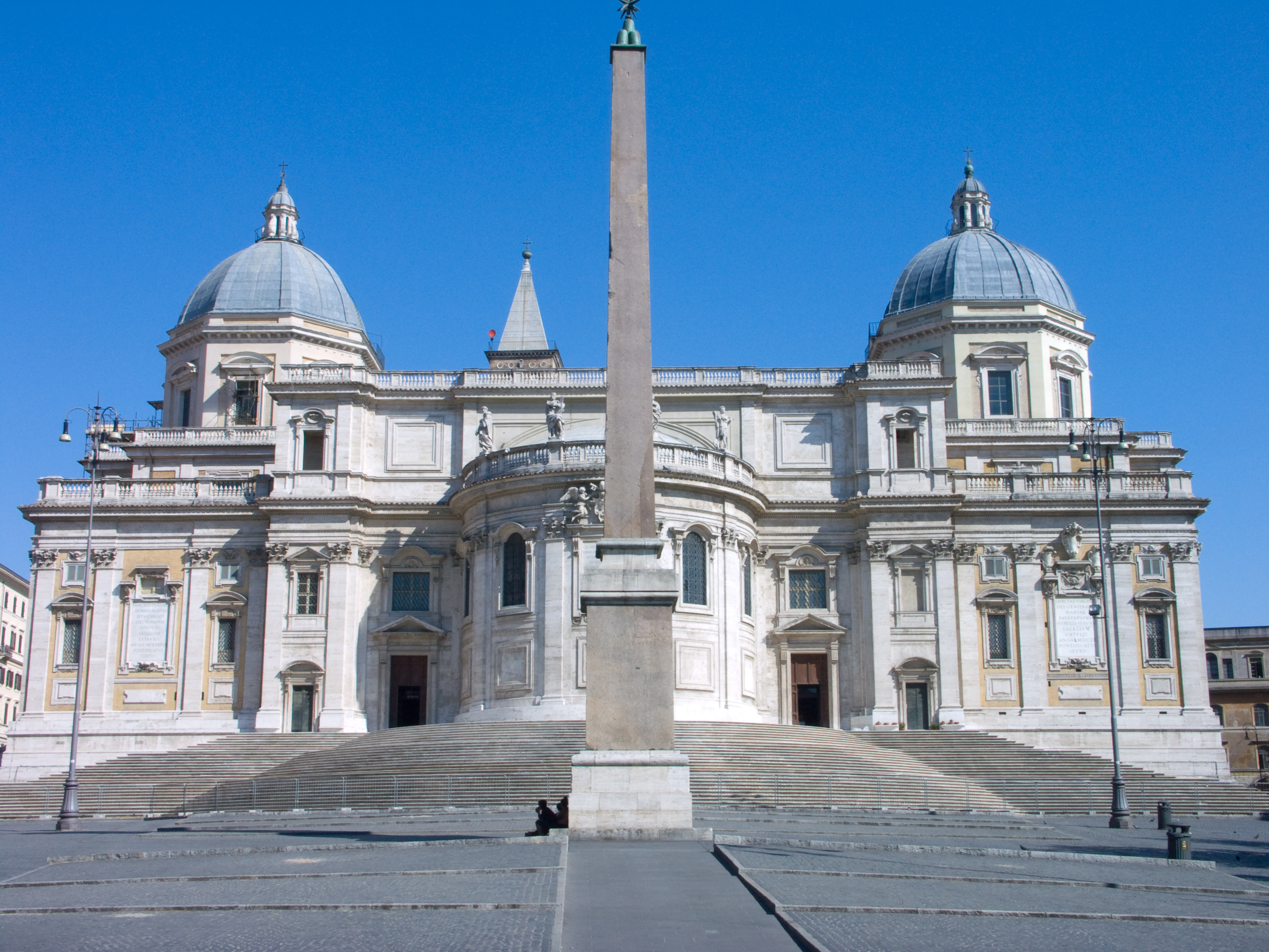 Rome, L'obélisque de l'Esquilin, érigé au chevet de la basilique Sainte-Marie-Majeure